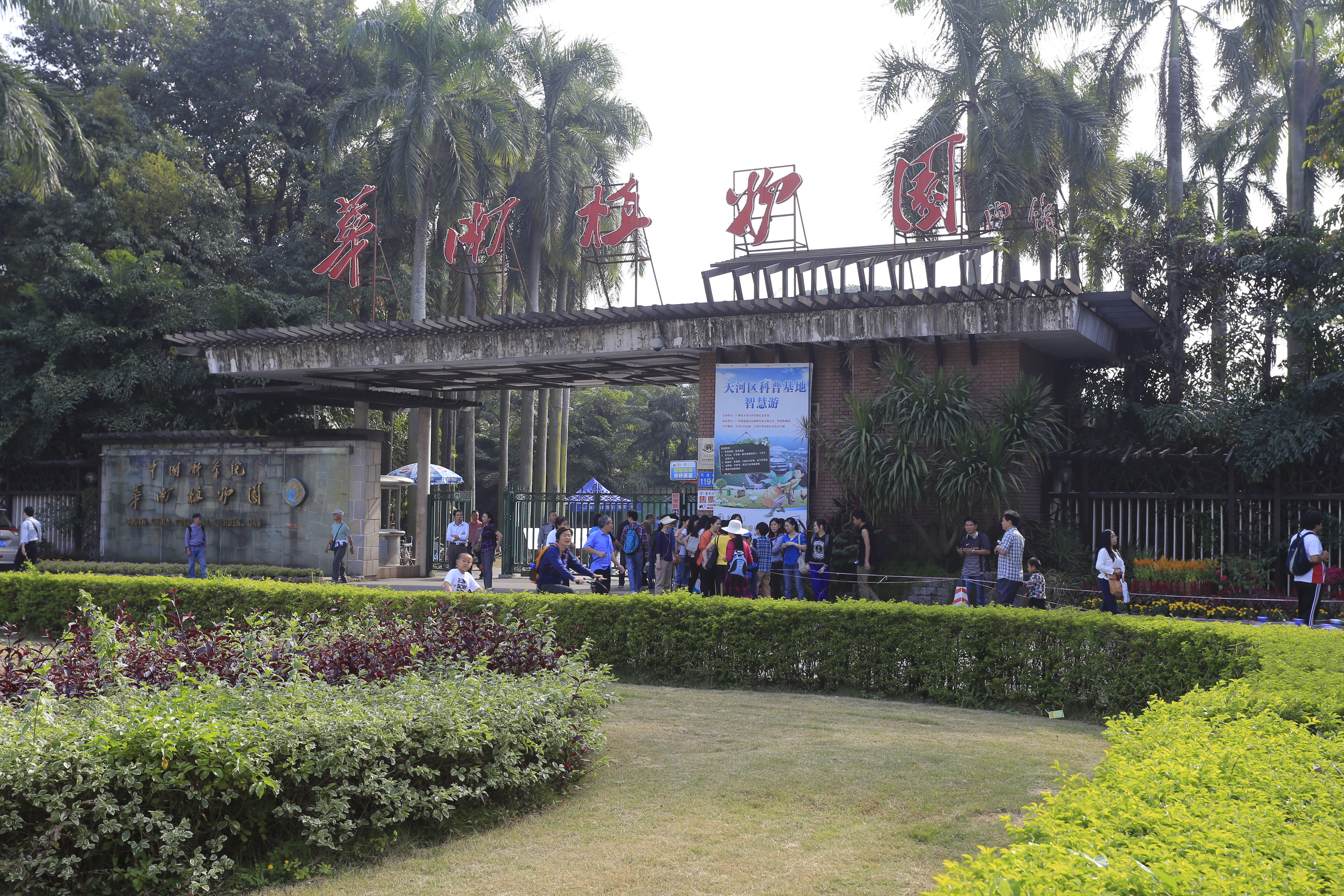 广州华南植物园南门